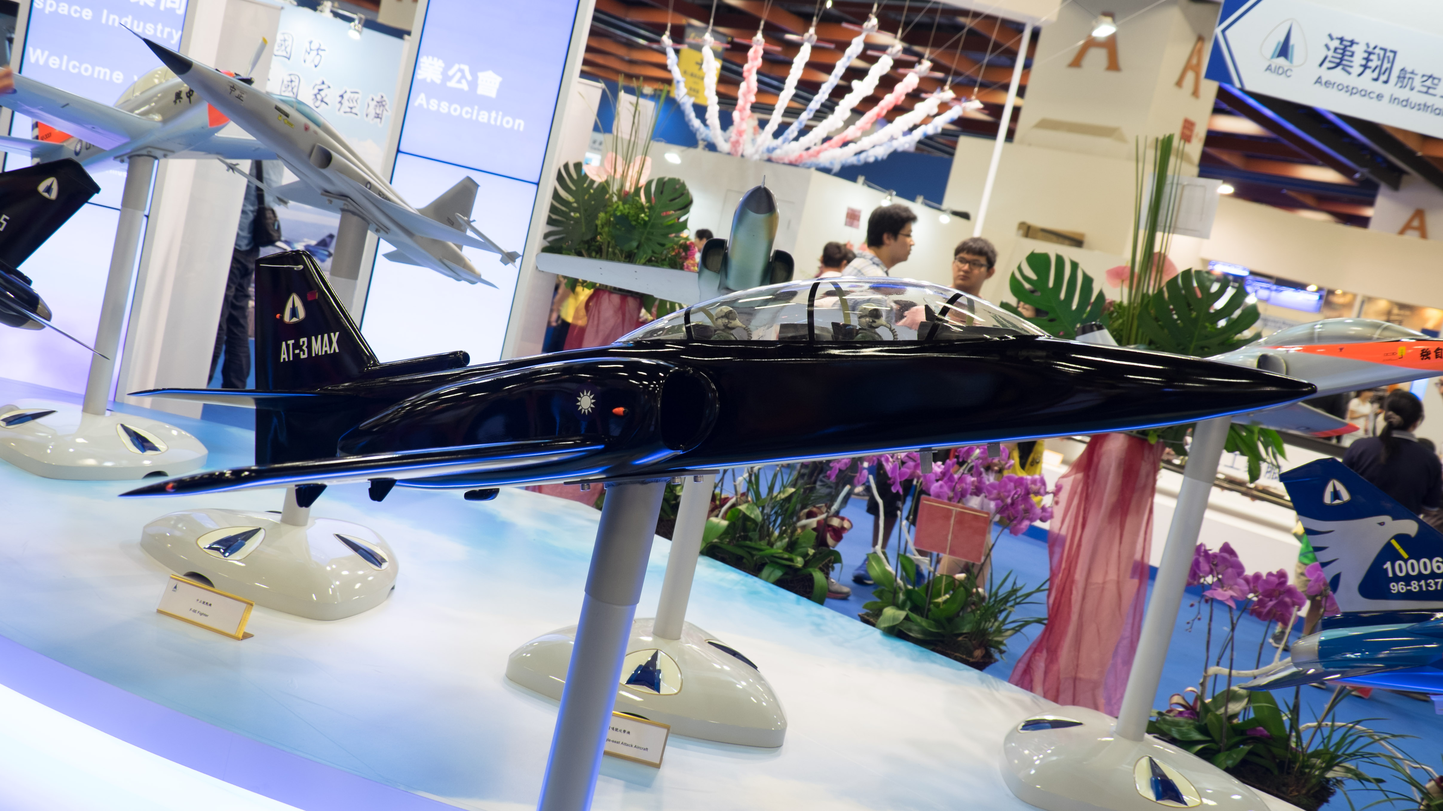 中文（台灣）: 2015台北國際航太暨國防工業展覽會，漢翔航空工業攤位展示的高級教練機AT-3 MAX模型。